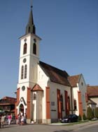 Crkva sv.Vida u Mraclinu.